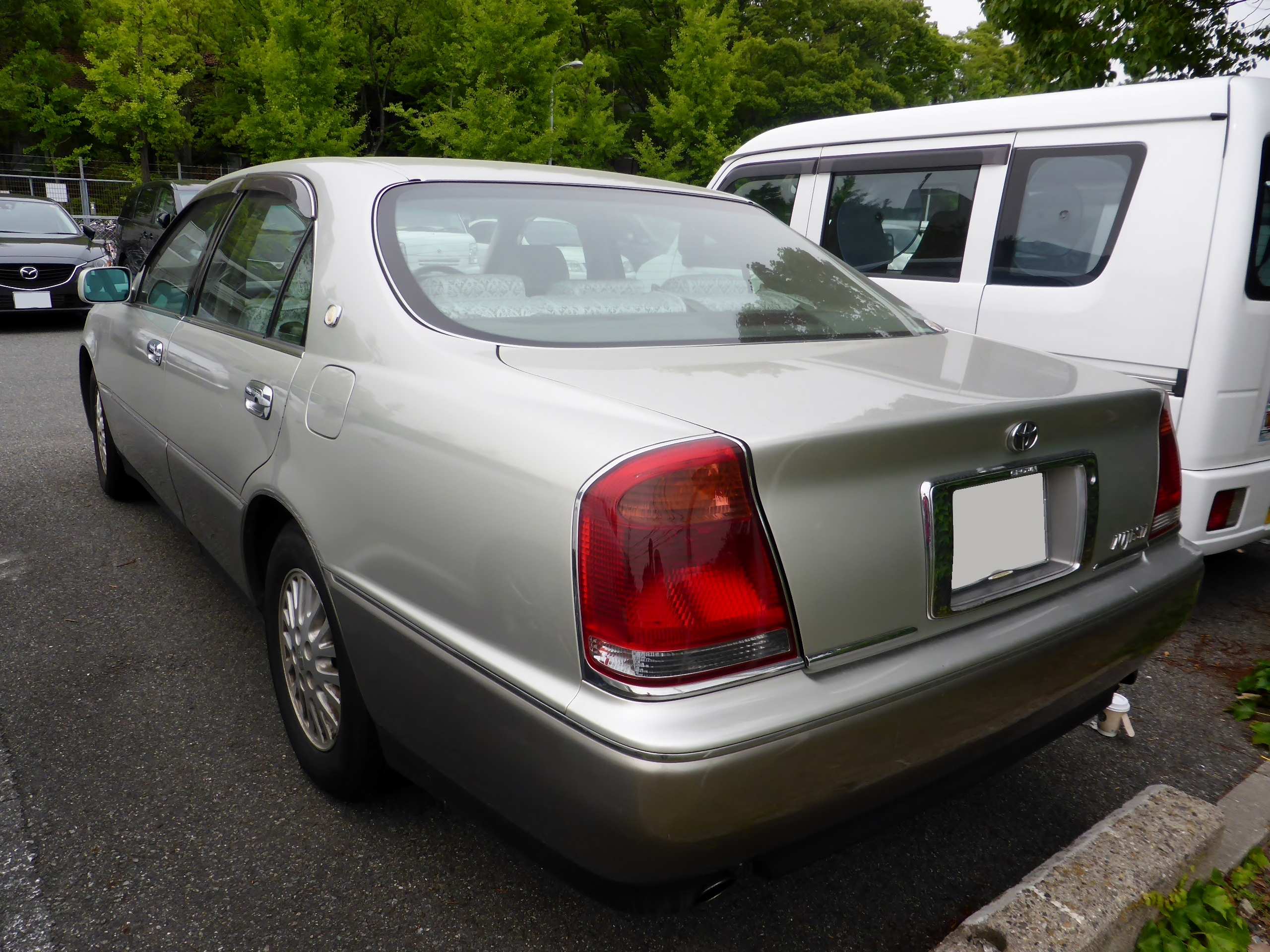 S150型トヨタ・クラウンマジェスタをリアから撮影。